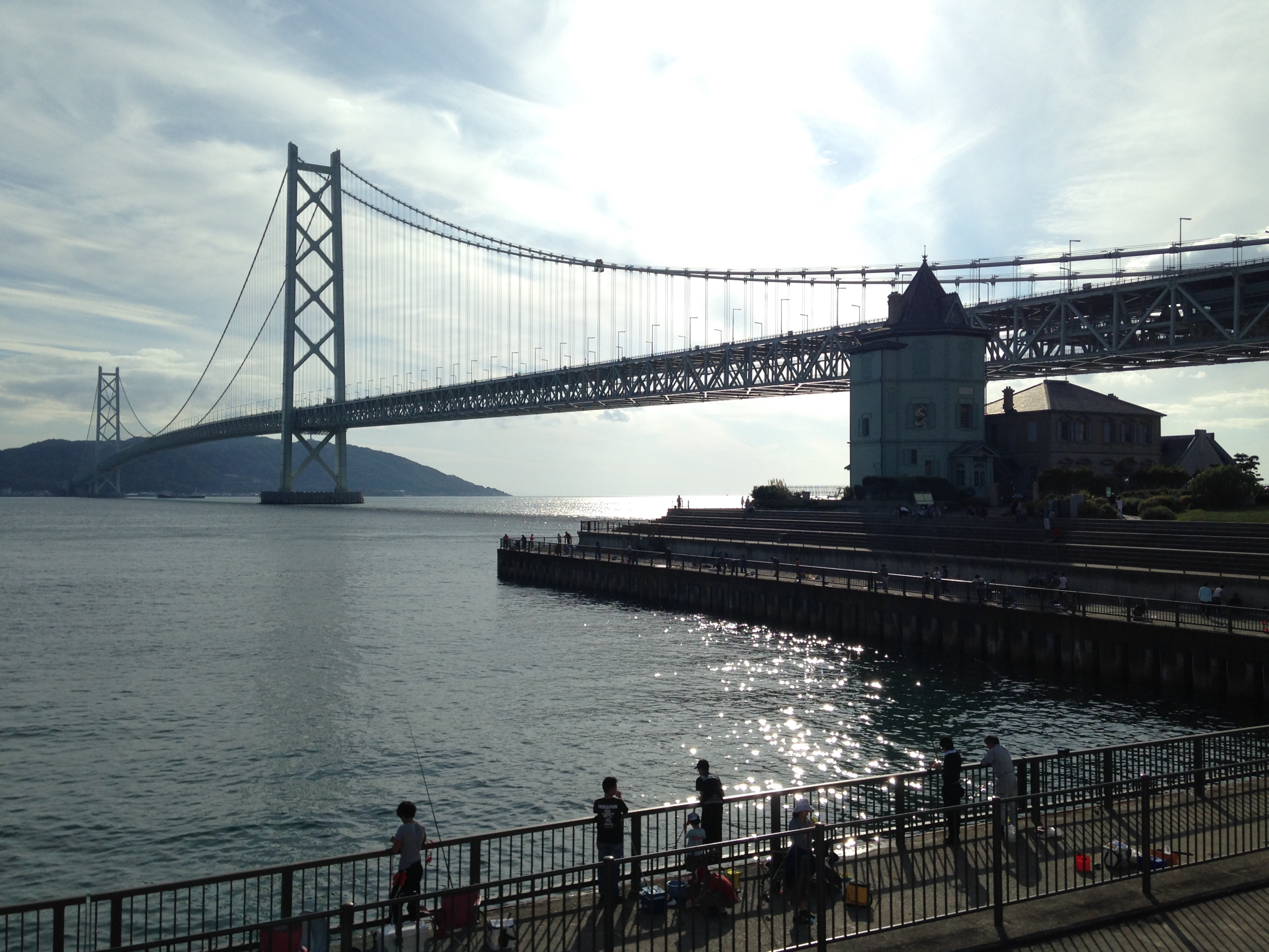 明石海峡大橋と孫文記念館